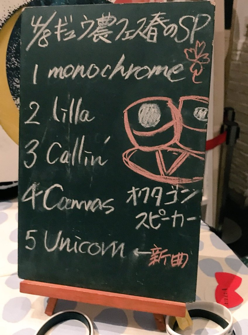 amiinAセトリボード(20180408(1))